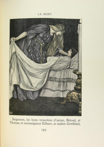 La mort de Tristan (The Death of Tristan), by Robert Engels, page 193.